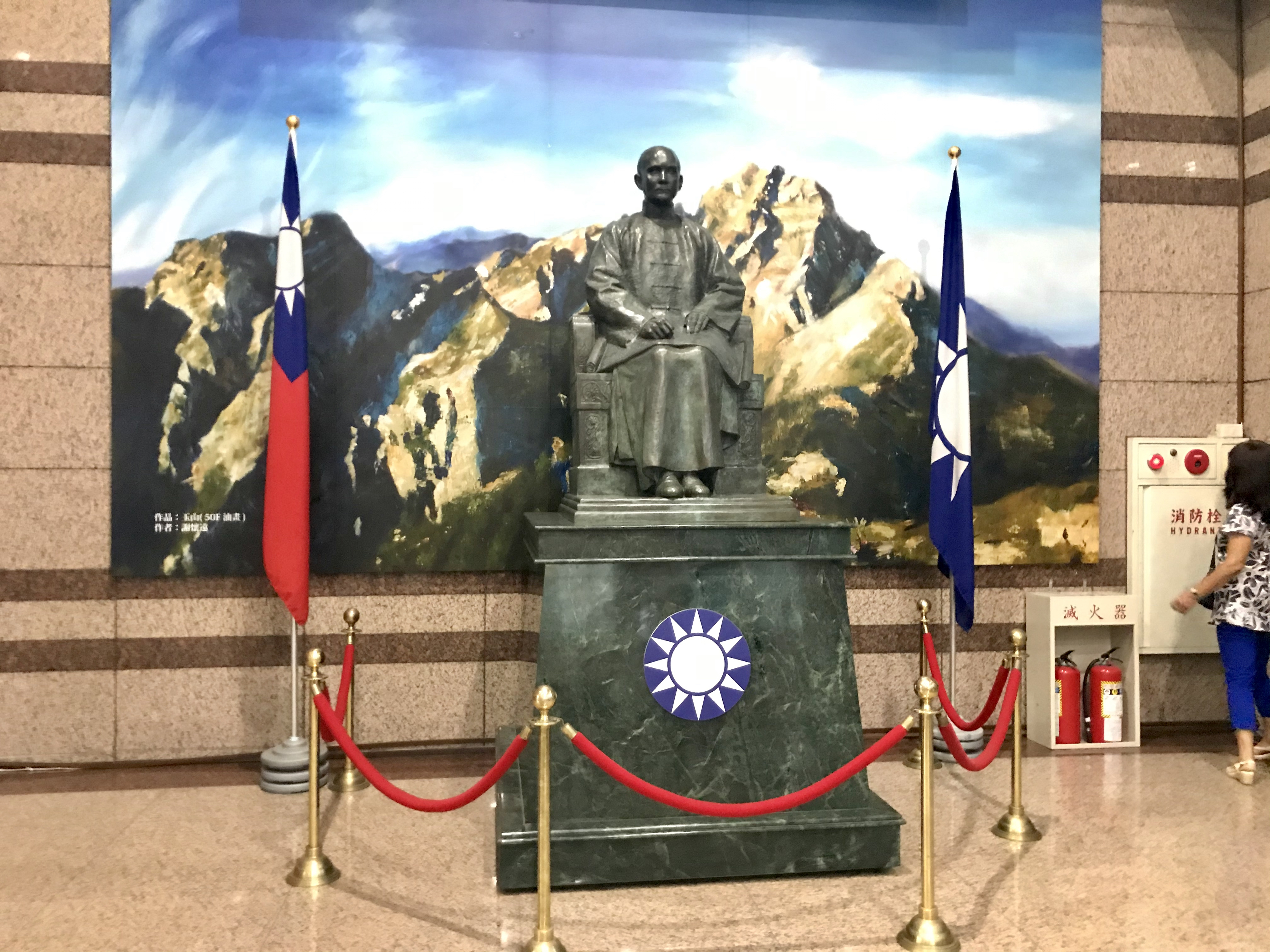 中国国民党中央党部内部一楼的孙中山像，拍摄于2019年10月7日，台北市中山区八德路二段